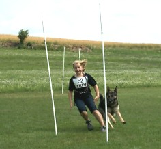 Slalom